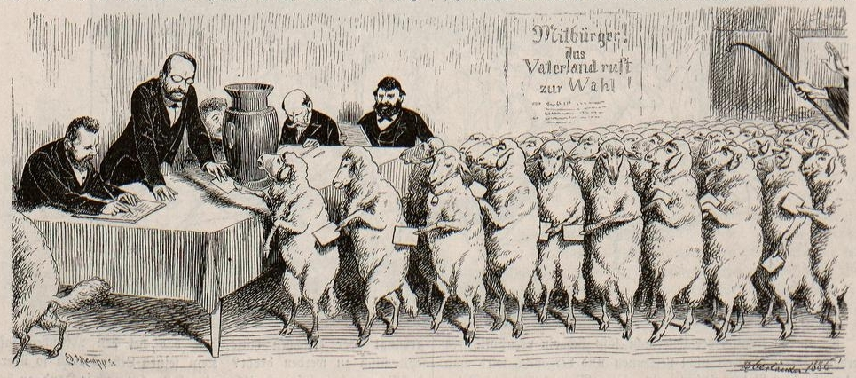 Fliegende Blätter, Band 85, Seite 36, Bild 2